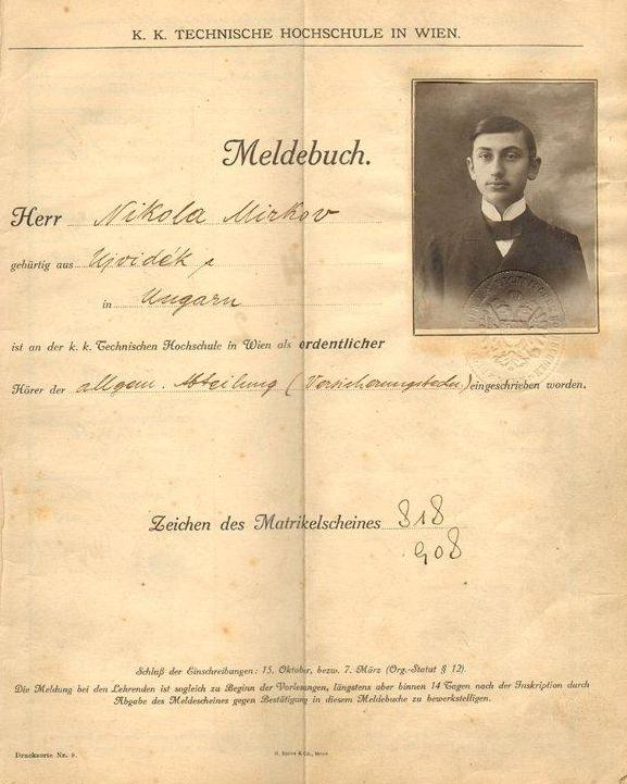 Српски (ћирилица): Никола Мирков је похађао техничку велику школу у Бечу 1908.1909. године.